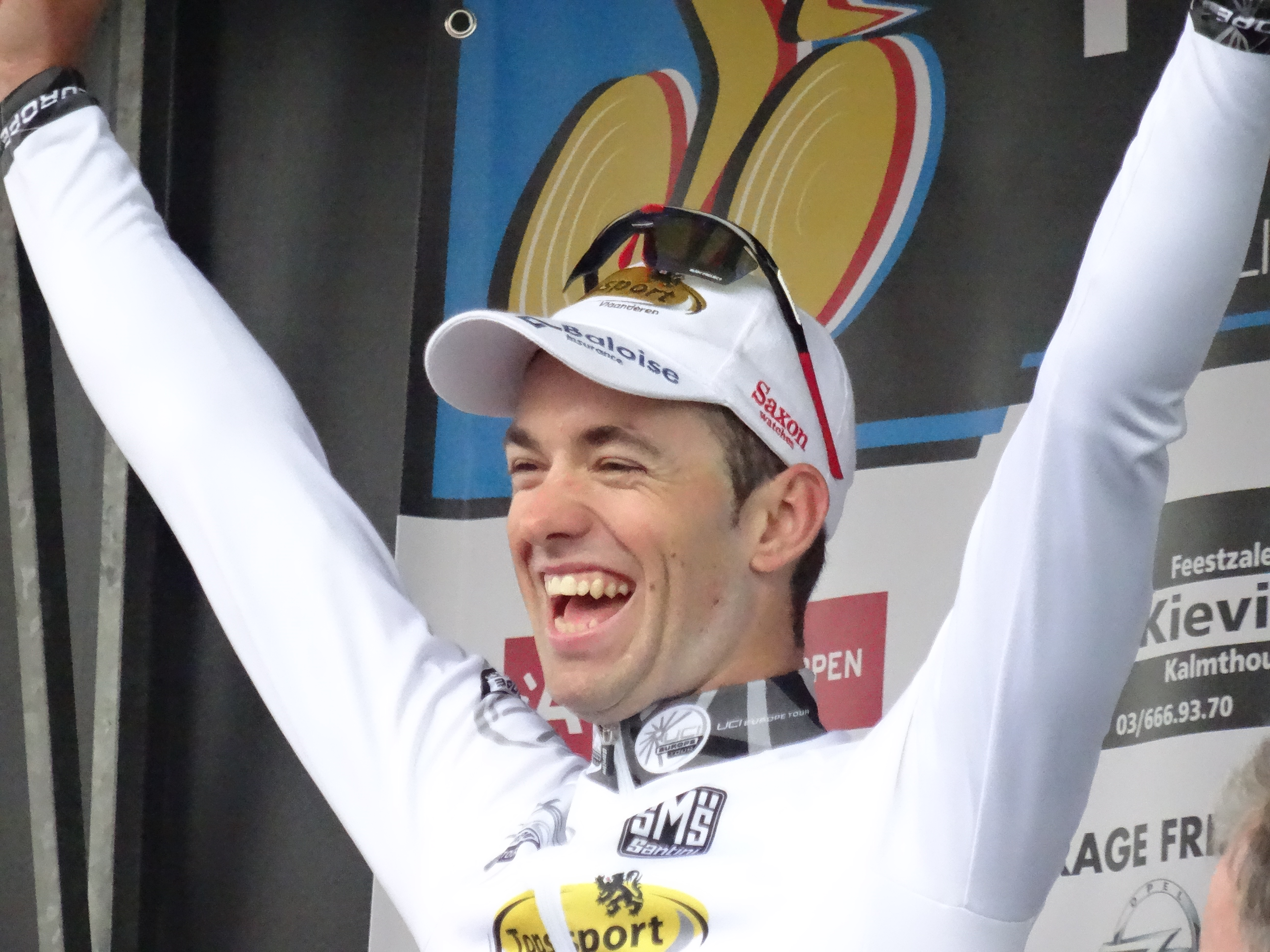 Reportage photographique réalisé le mardi 14 octobre à l'occasion du départ et de l'arrivée du Prix national de clôture 2014 à Putte (Woensdrecht, Pays-Bas) et Putte-Kapellen (Kapellen, Belgique).